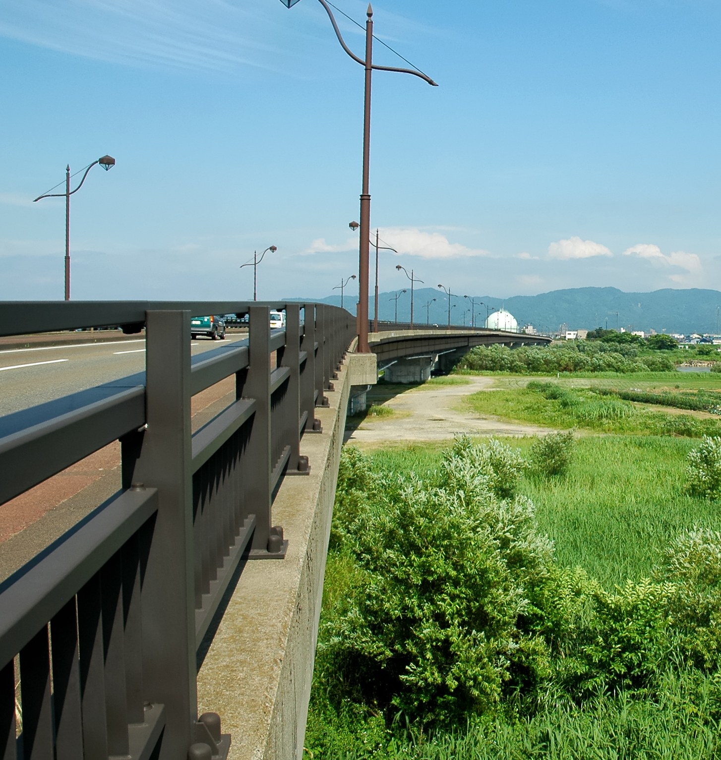 Zao Bridge (蔵王橋, 新潟県長岡市)